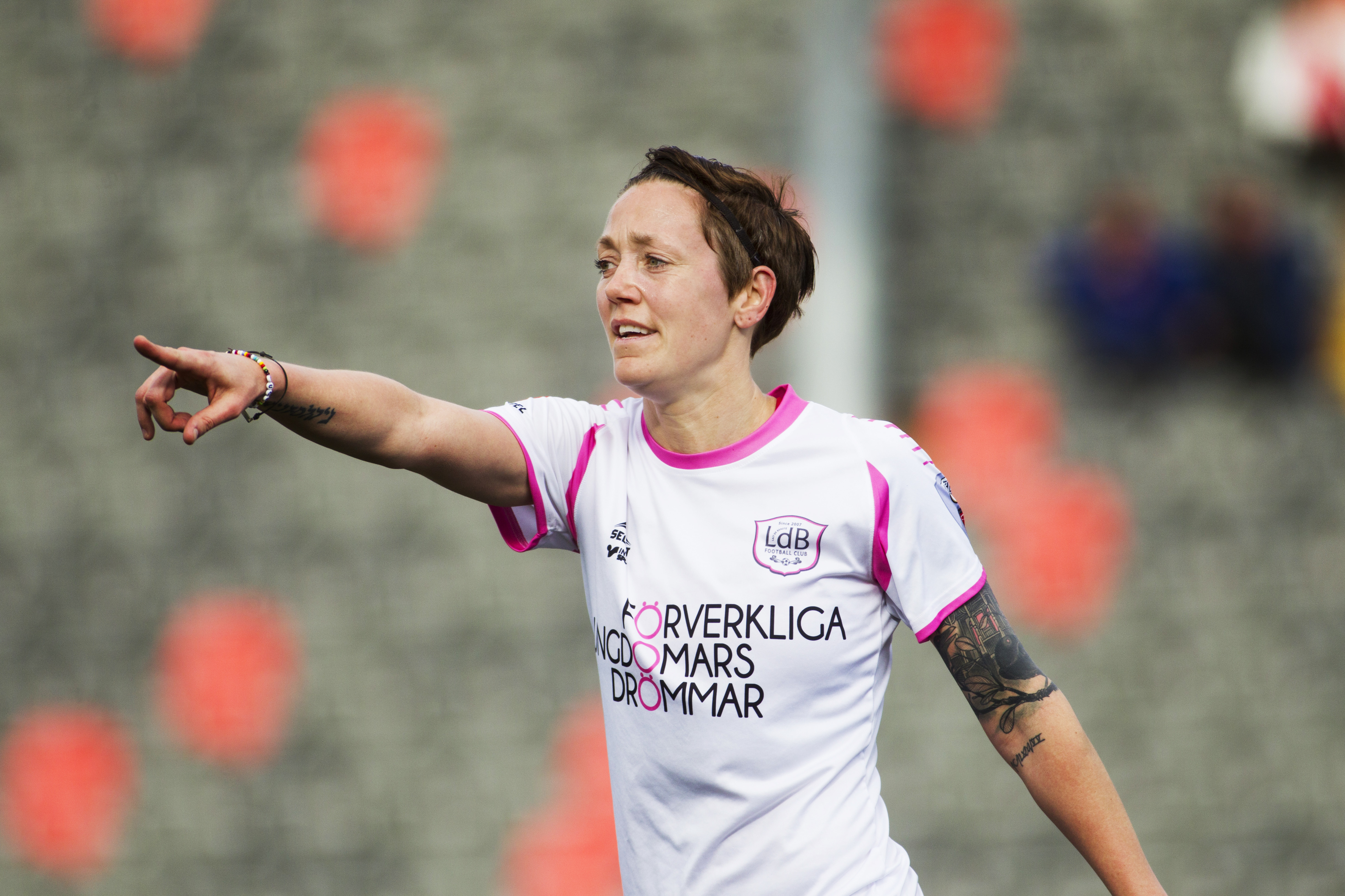 Svensk fotbollsspelare Therese Sjögran